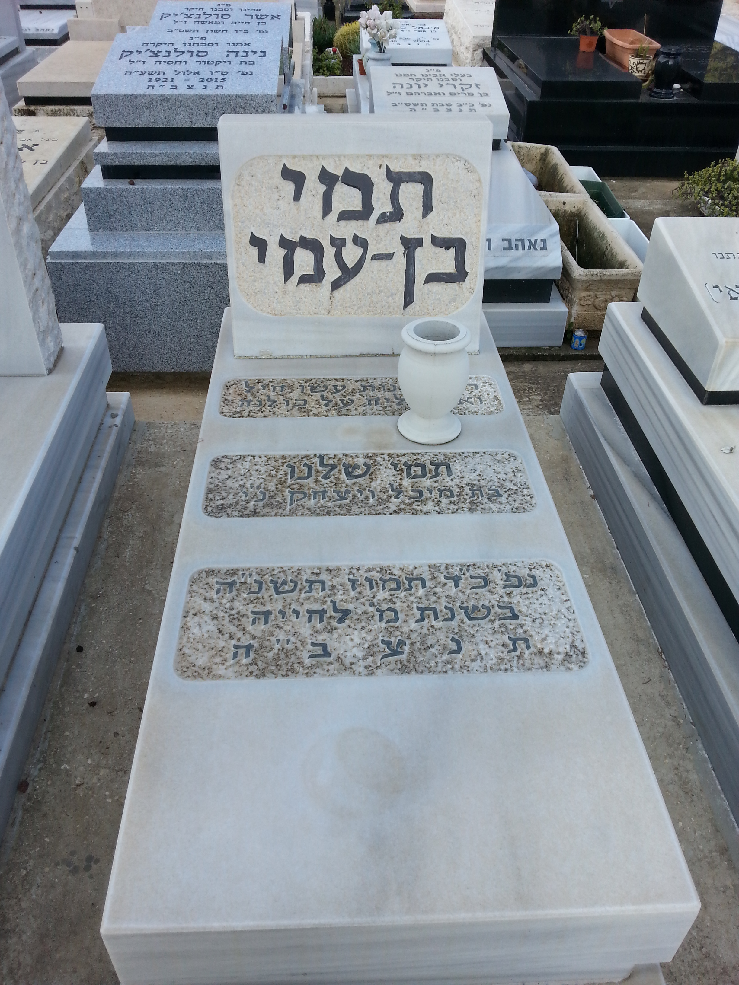 קברה של תמי בן עמי - בית עלמין גורדון החדש. ראשון לציון